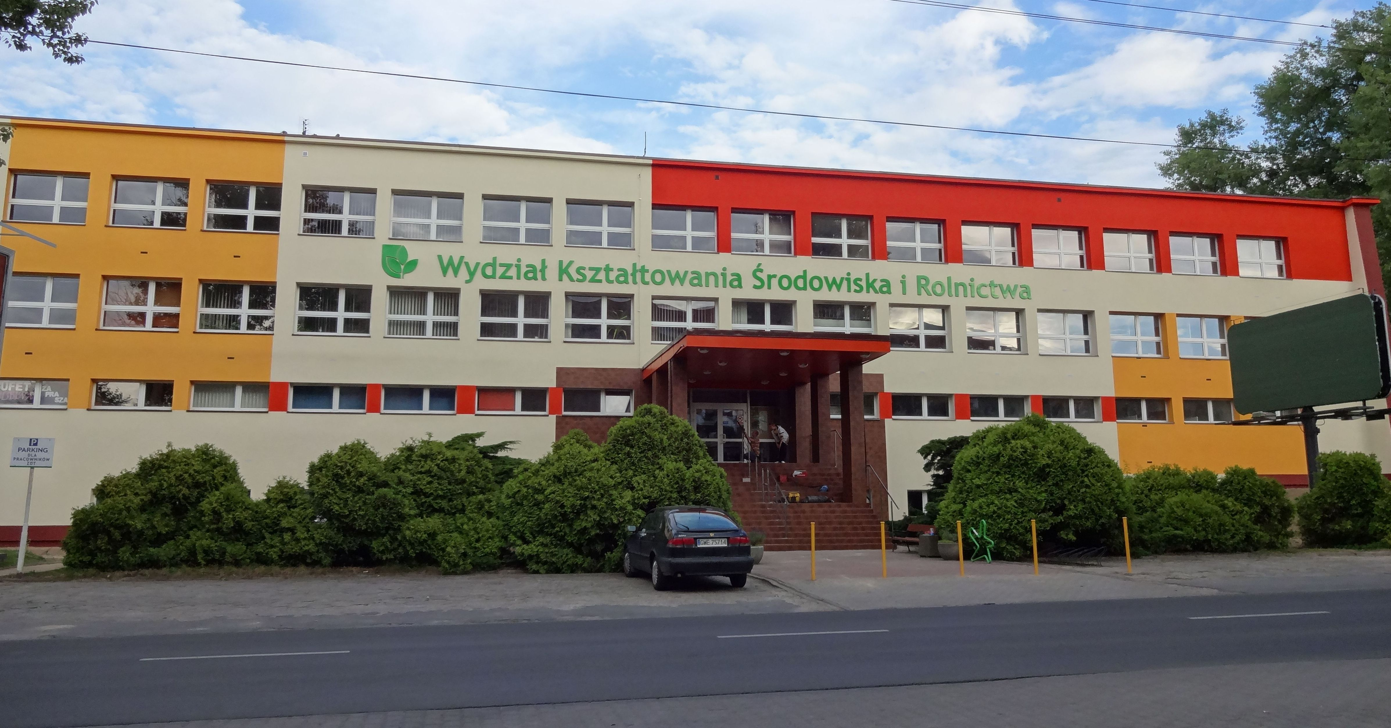 Budynek Wydziału Kształtowania Środowiska i Rolnictwa ZUT w Szczecinie przy ulicy Papieża Pawła VI nr 1